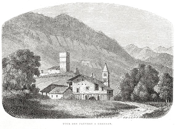 Xilografia del 1860 di Édouard Aubert intitolata "Tour des Pauvres a Gressan". La Tour des Pauvres è più nota con il nome di "Castello de La Tour de Villa" o "Tour de Ville", Gressan, Valle d'Aosta. In primo piano probabilmente la Chiesa della Madelaine di Gressan, dal campanile romanico.